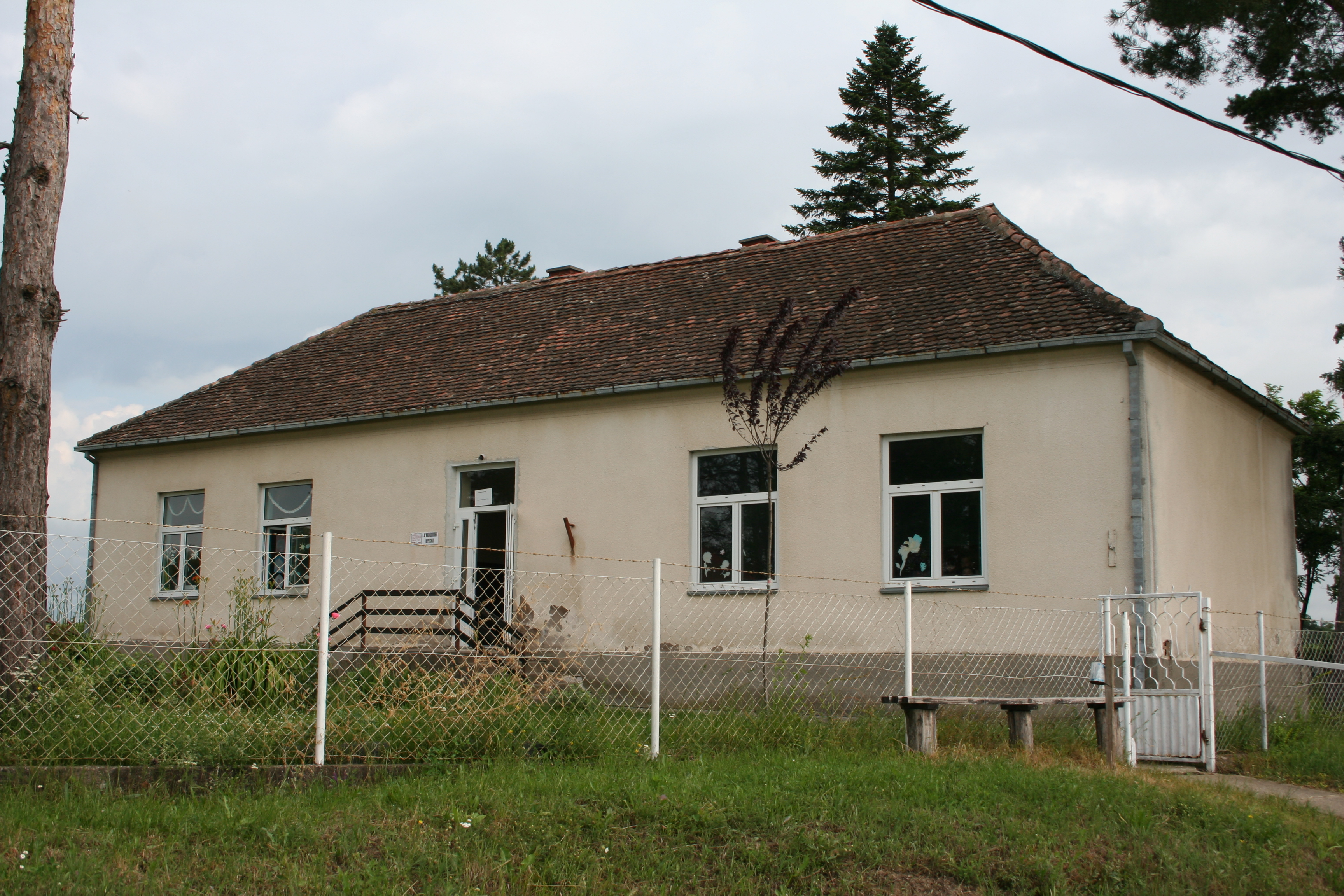 Škola u Matijevcu, opština Vladiimirci